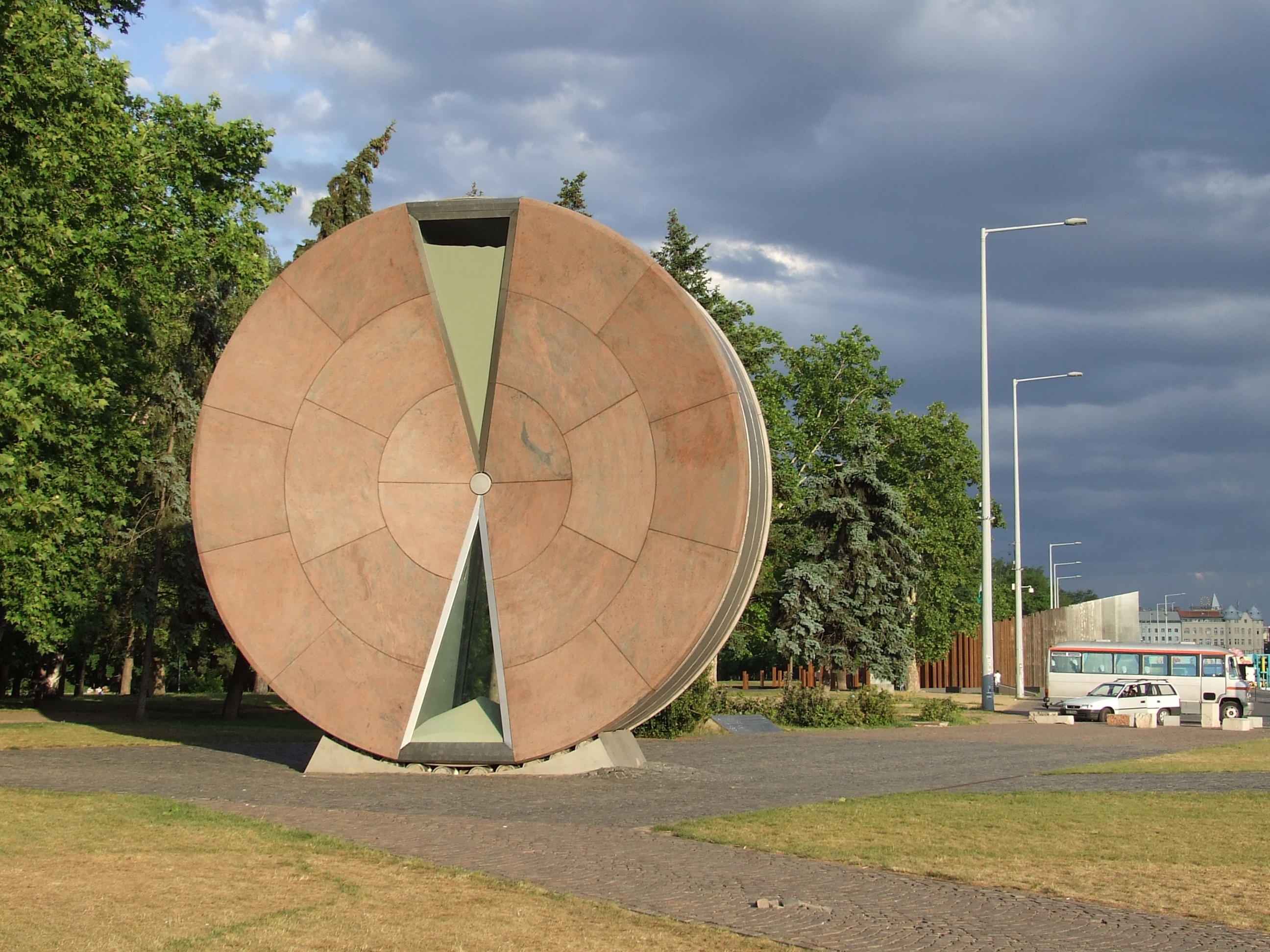 A budapesti Ötvenhatosok terén található Időkerék. Háttérben az 1956-os emlékmű